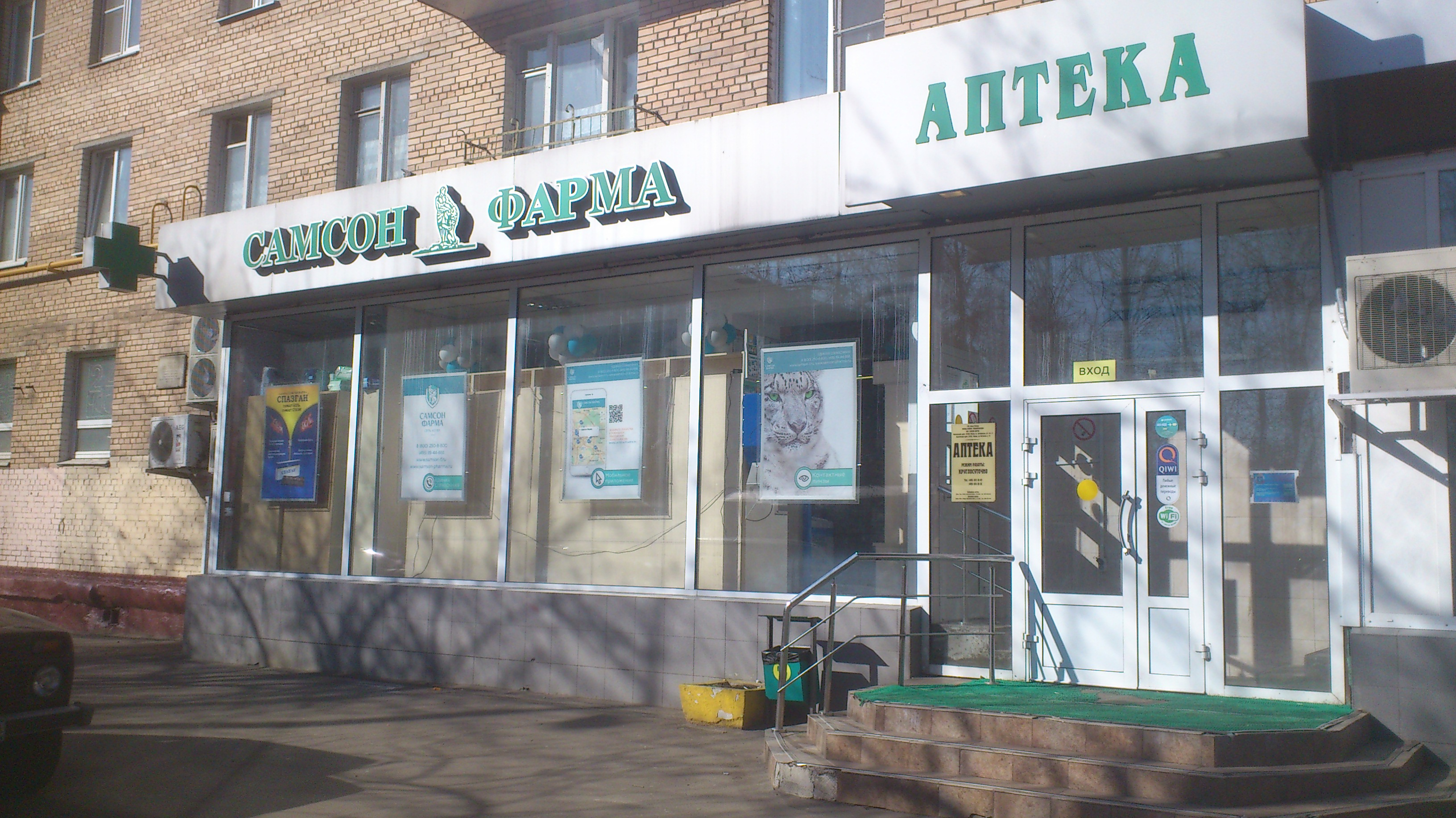 Аптека "Самсон-Фарма" на ул.Костякова, д.15, Москва.